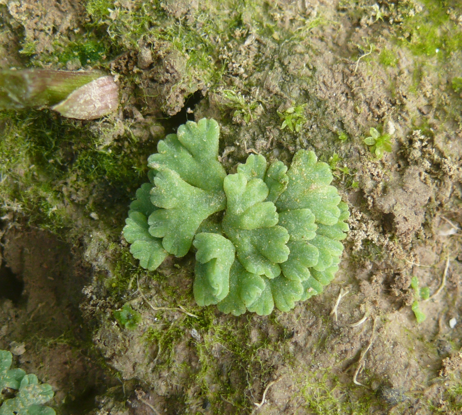 Riccia glauca, Hohenloher Ebene, Deutschland